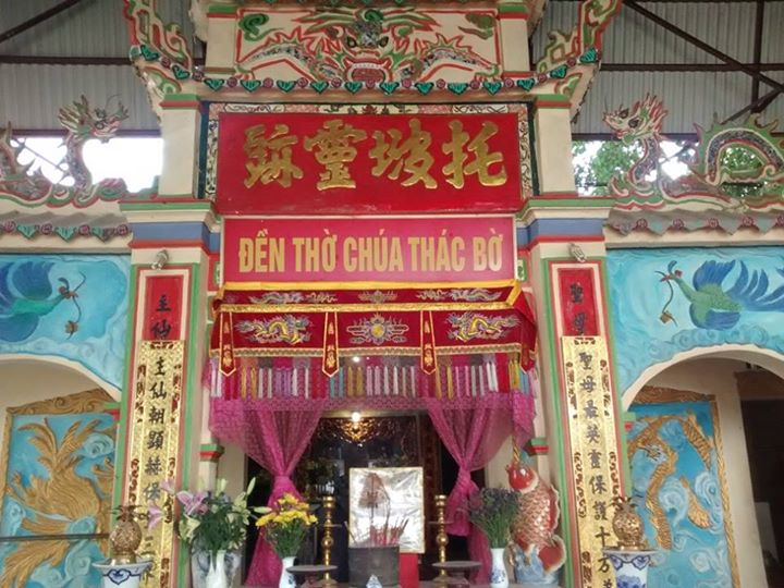 Đền Chúa Thác Bờ, Cao Phong, Hòa Bình